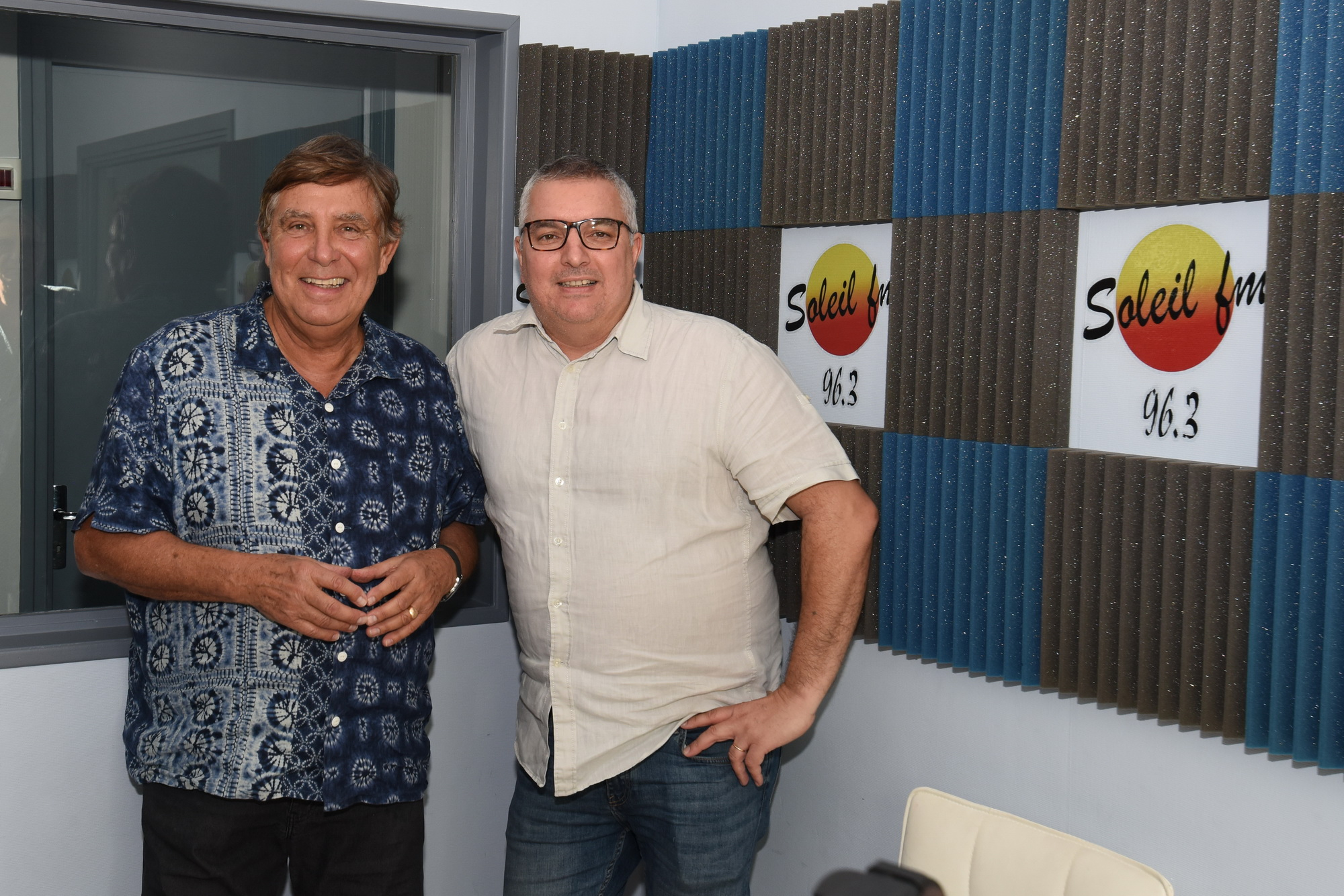 Jean Pierre Foucault et Hakim Yckache